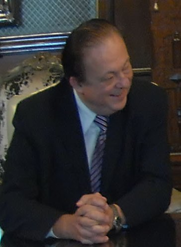 Fernando Gioino. CONINAGRO, SanCor. En entrevista con el gobierno durante el paro patronal agropecuario de 2008. Argentina